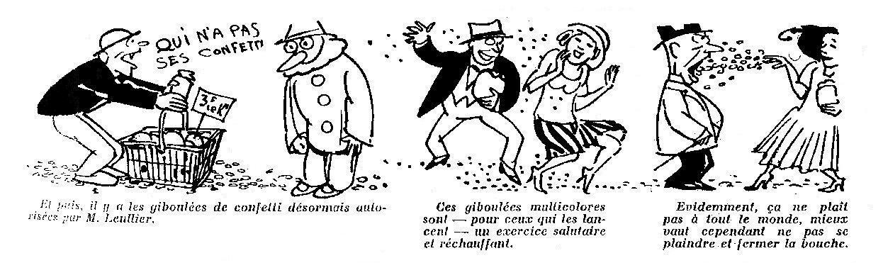 Les confettis autorisés en 1922 par le préfet de police de Paris Leullier.